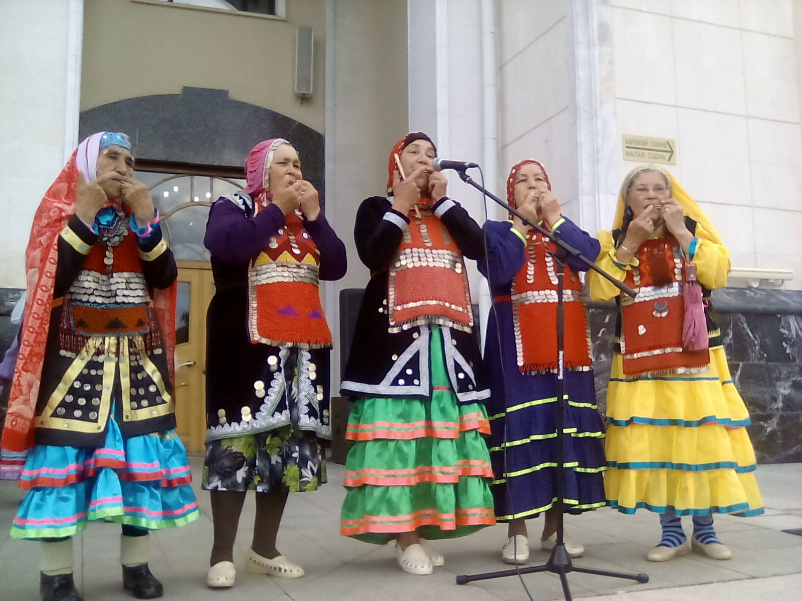 Кубызистки